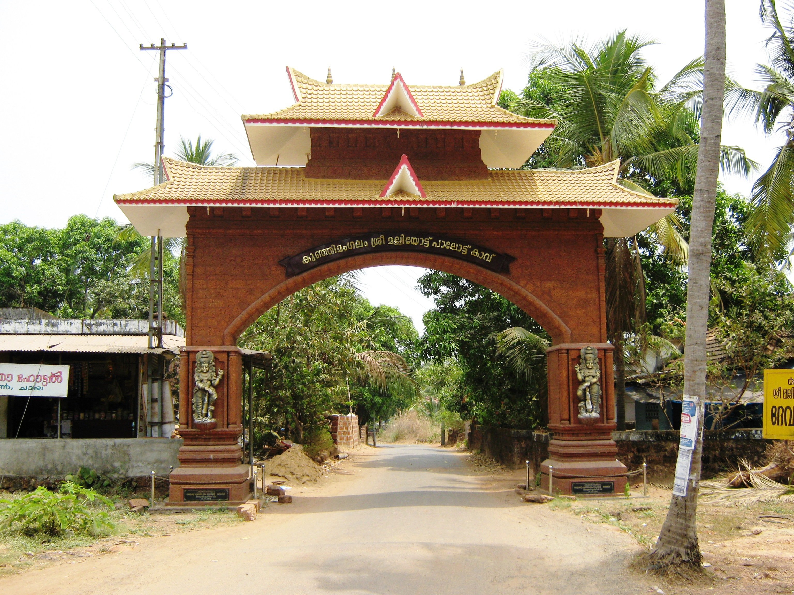 Kannur, Kerala, India.